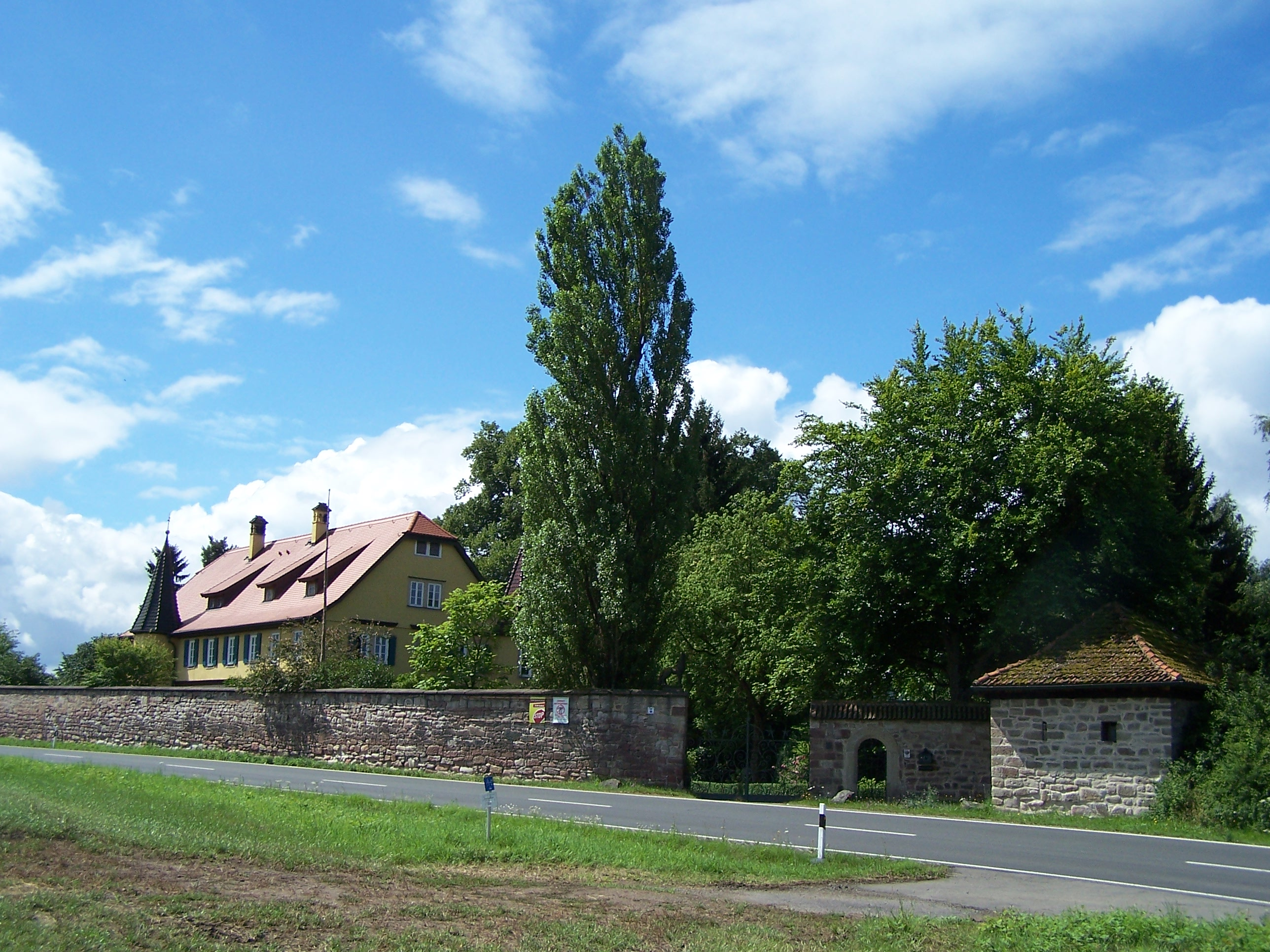 Die Ostseite der einstigen (Zoll-)Burg Todenwarth.